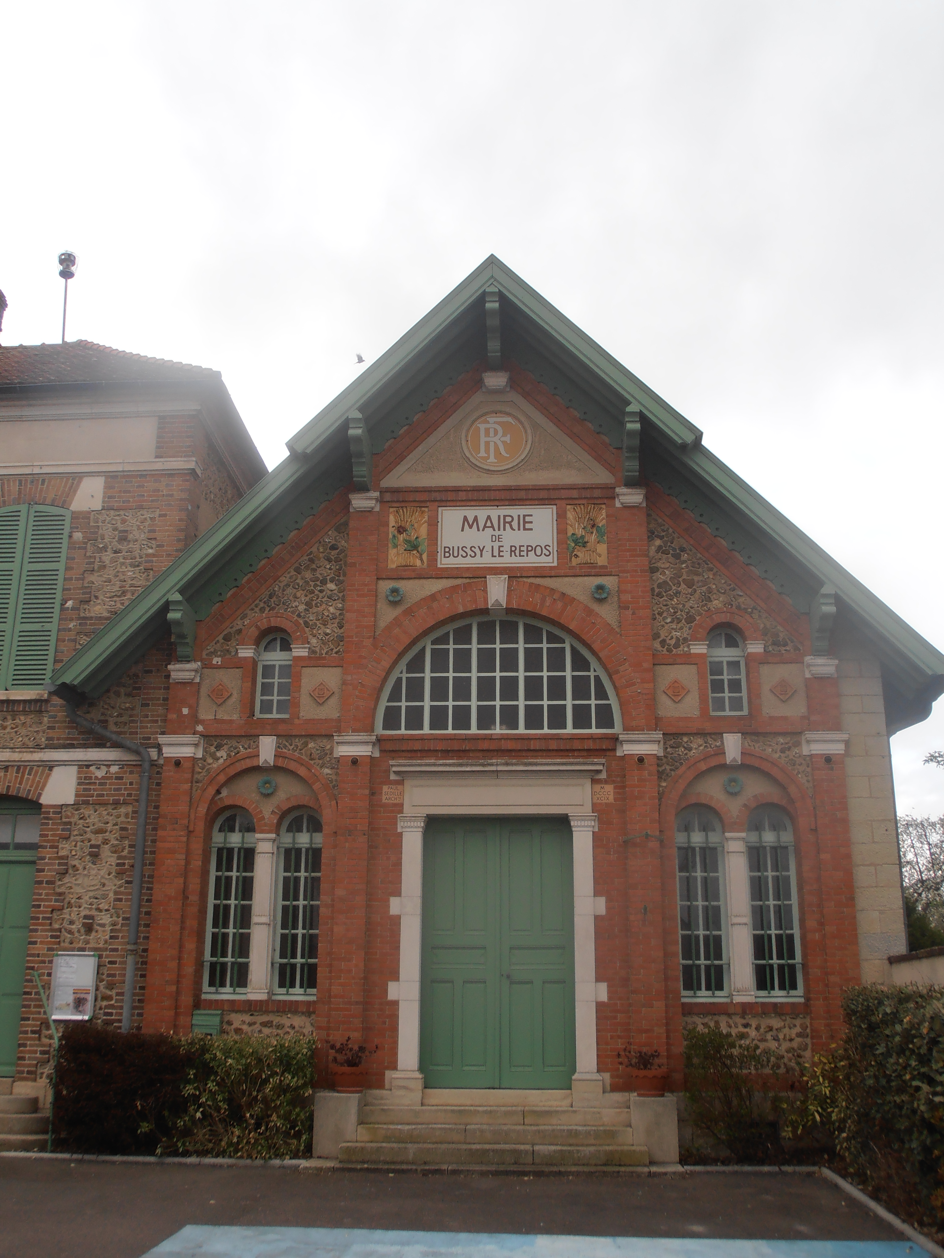 Mairie de Bussy-le-repos (Yonne) France